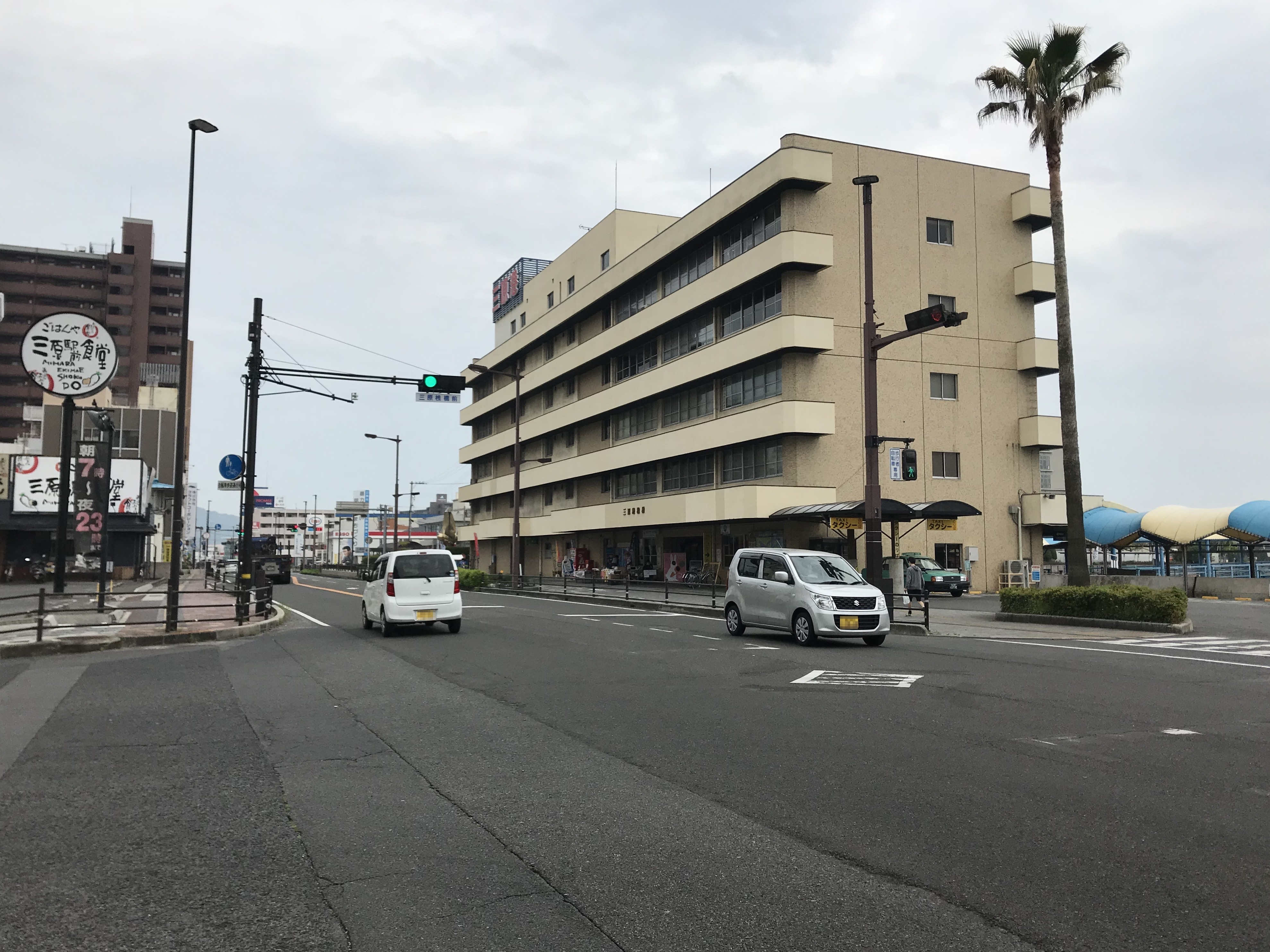 三原港桟橋と国道185号